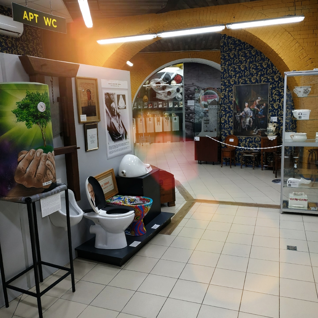 Вид на художні експонати Музею історії туалету